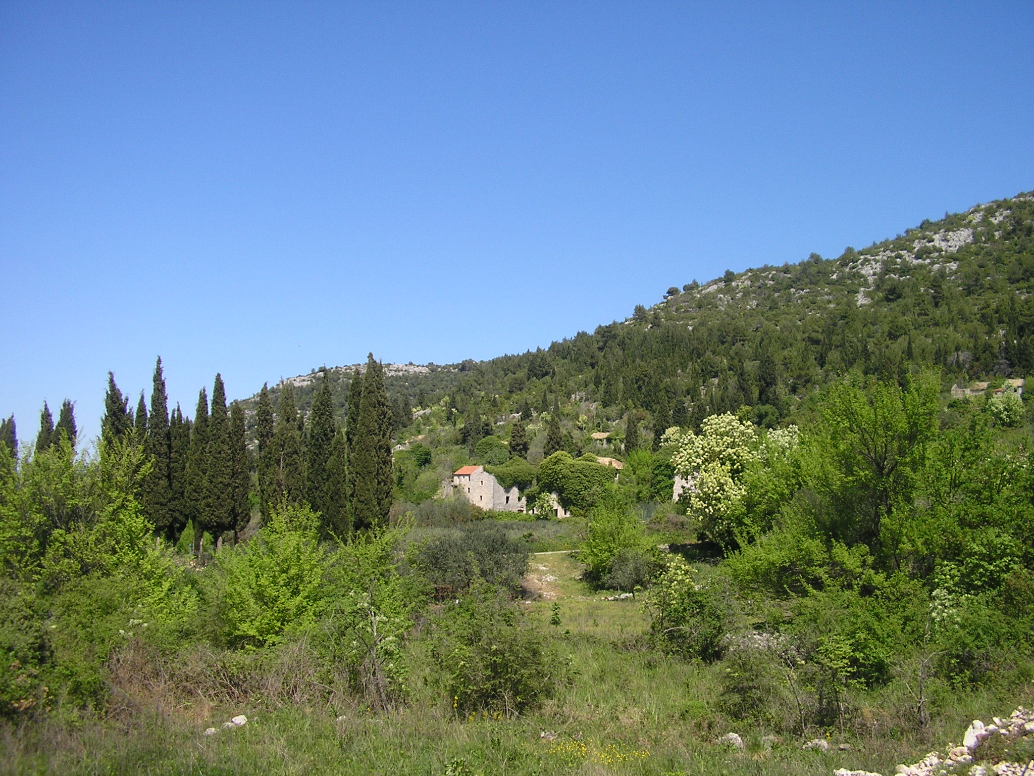 Slivno-Ravno